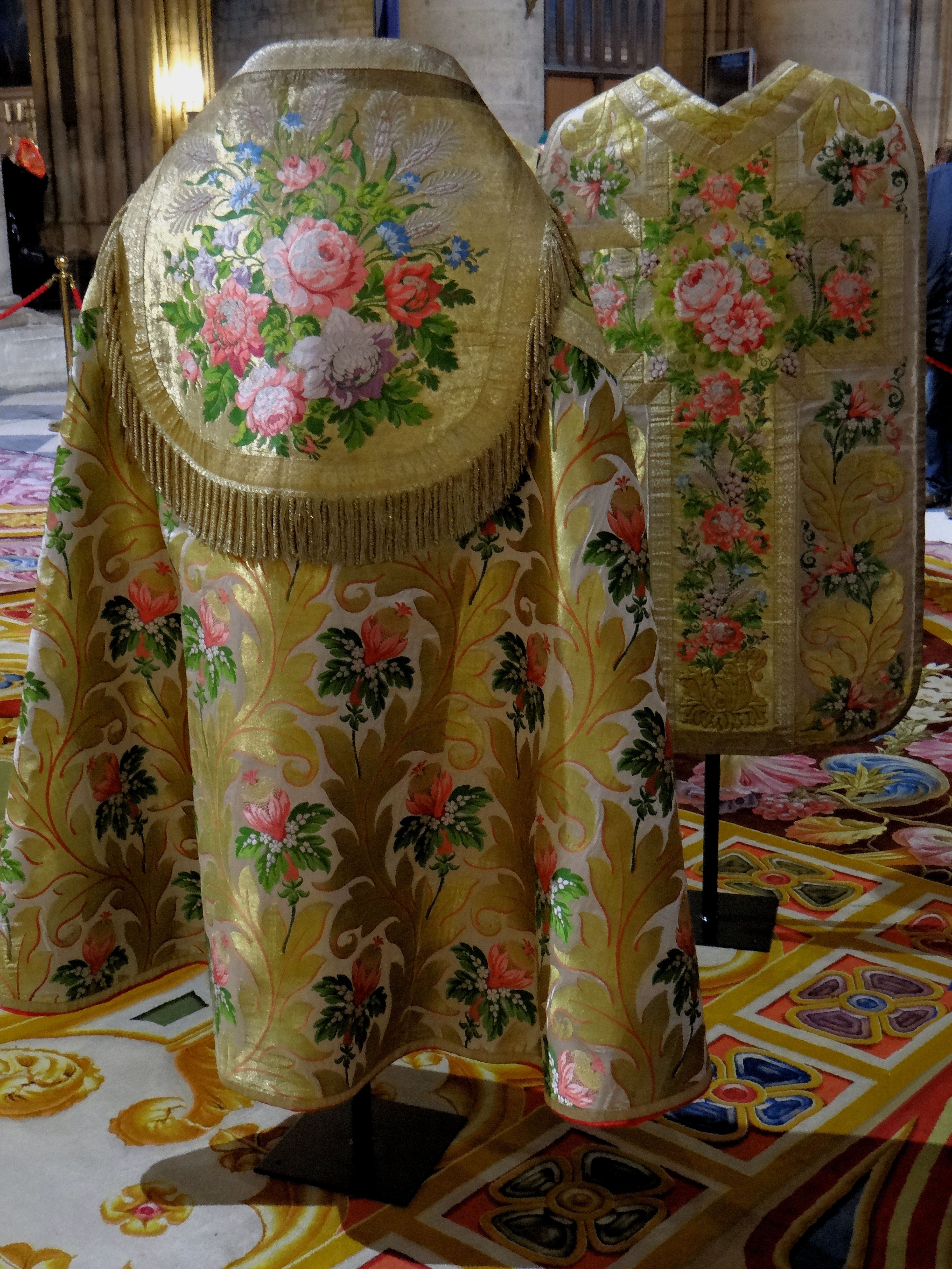 Chape et Chasuble de l'ornement « Napoléon III ». Grand ornement Pontifical dans un brocard d’or, au dessin de feuillage sur fond de satin blanc broché, le décor est rehaussé de soies « nuées » aux motifs de fleurs, grappes de raisins et épis de blés. Provenance : commandé par le Mobilier de la Couronne en 1837. Ensemble de 2 chasubles avec accessoires, 2 dalmatiques, 6 tuniques, 16 chapes, 2 housses de pupitres pour l’Épître et l’Évangile, 1 grémial. Auteur: Grand Frères, fabricants d’étoffes de soie à Lyon, 1837-1839.